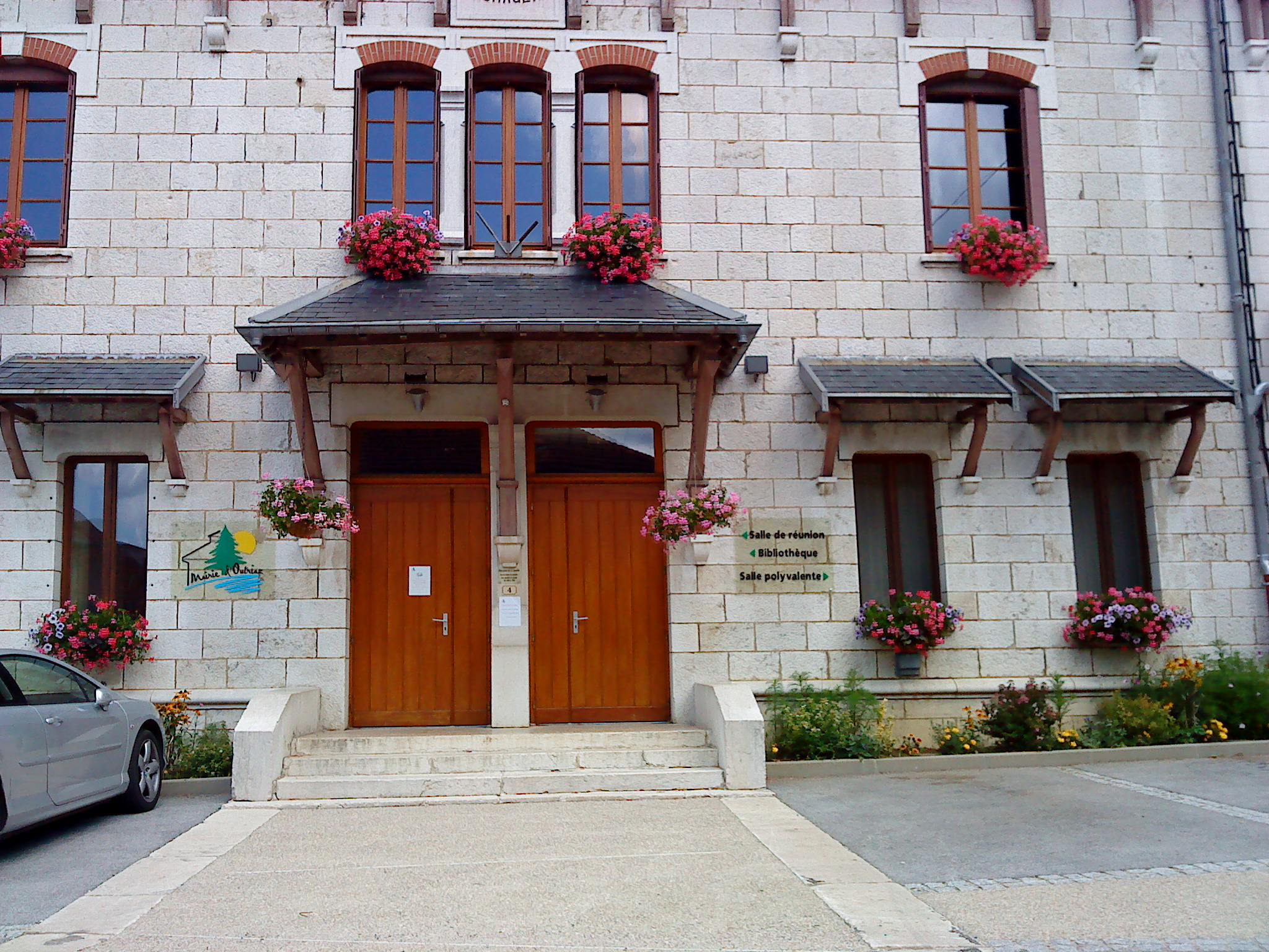 Façade de la mairie de la commune d'Outriaz (Ain, France)